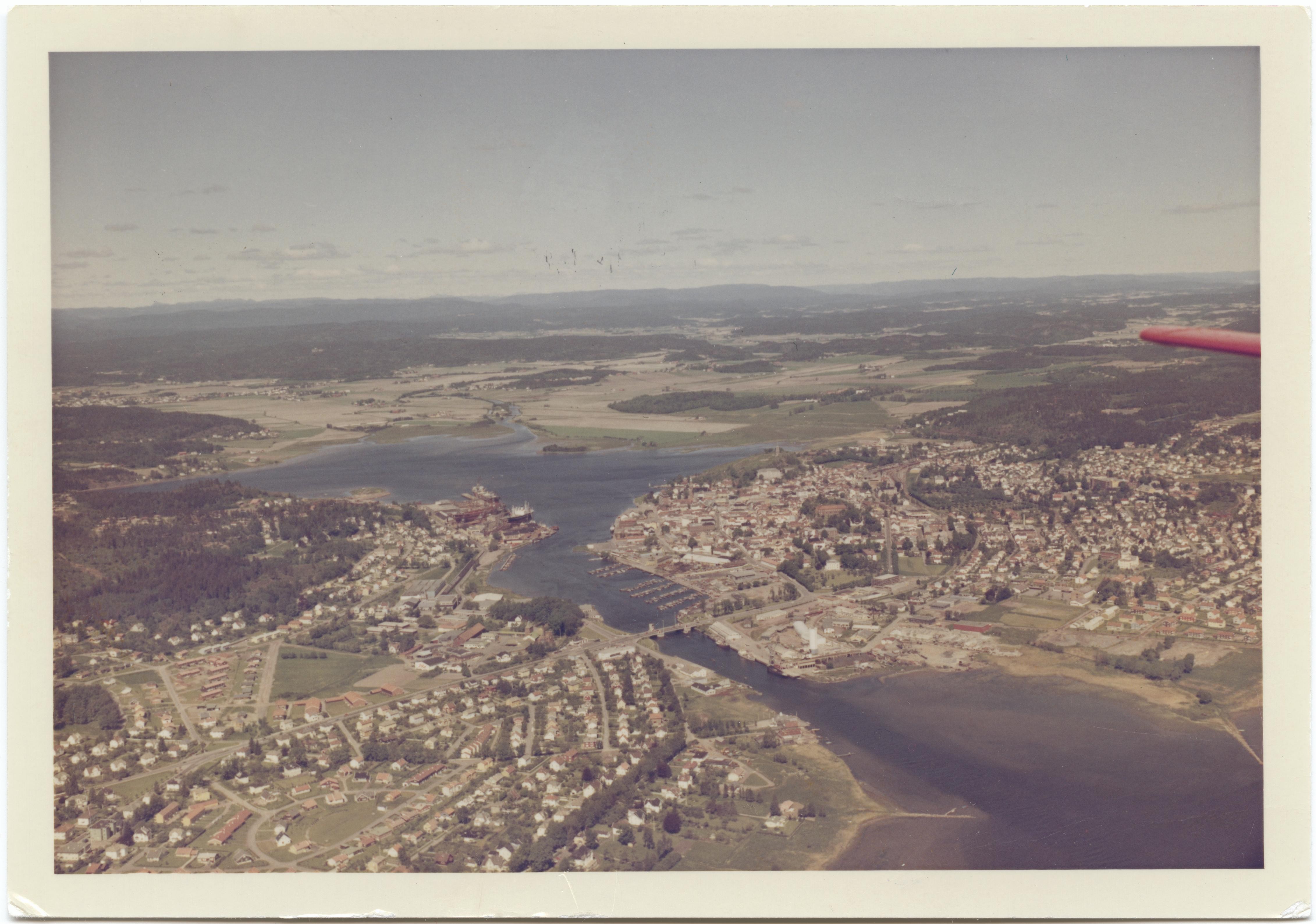 WF.S.175859